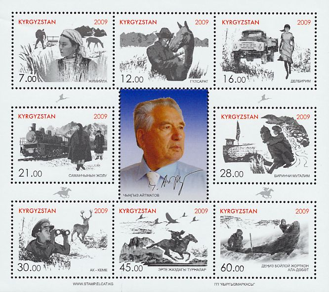 «Chyngyz Aitmatov and his arts» 577-584, number by Kyrgyz catalogue